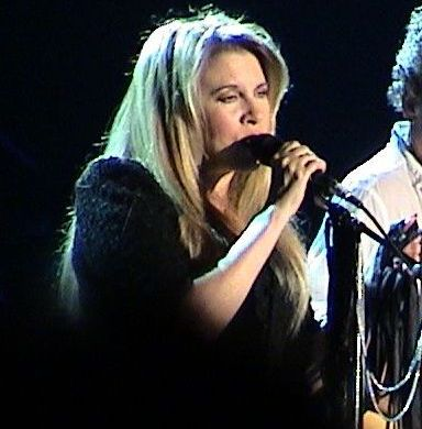 Stevie Nicks ( Oberhausen 2003) - eigendom Bumperke